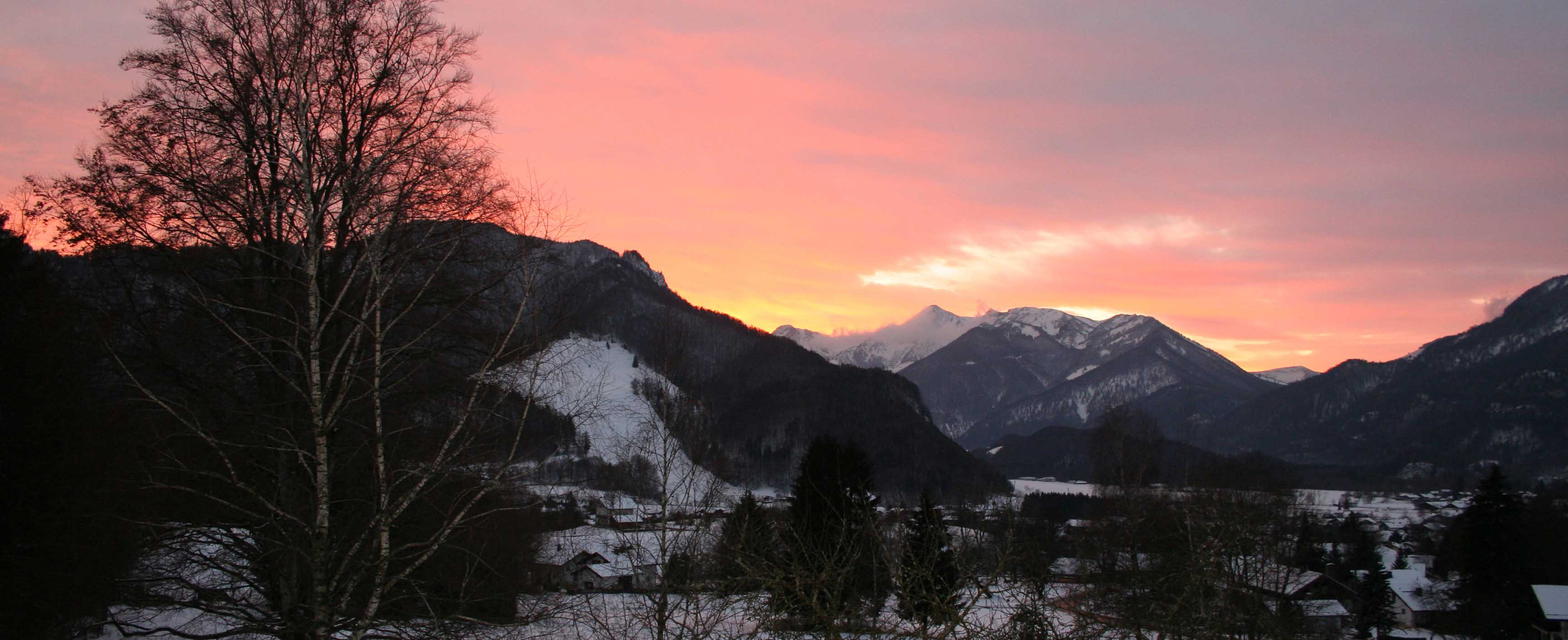 Geigelstein